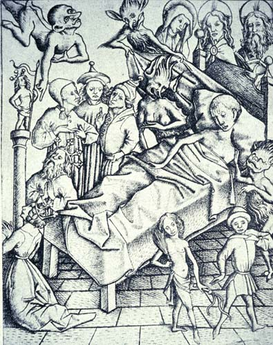 Temptation from Faith, Ars moriendi, Versuchung im Glauben L.175